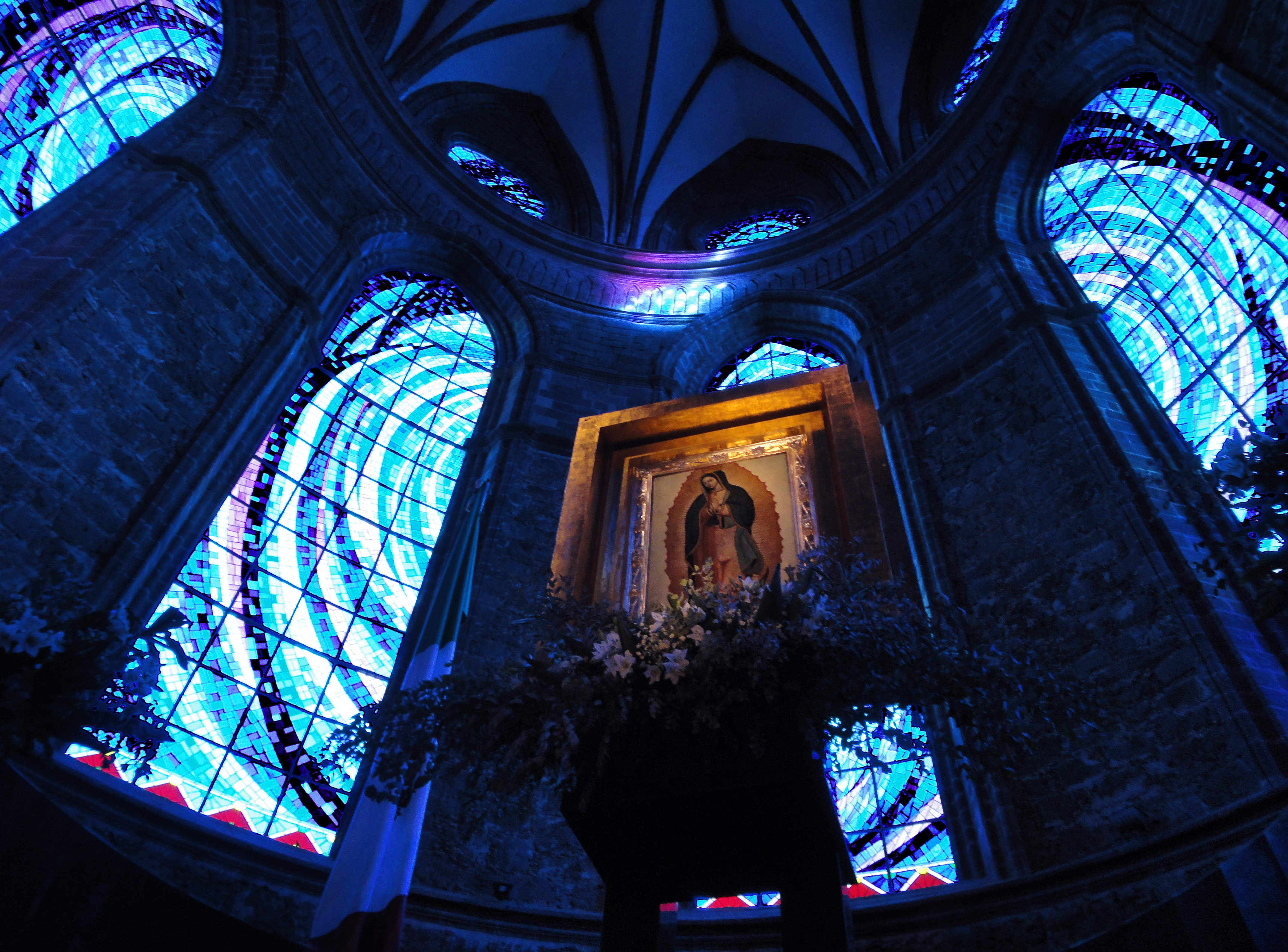 Lienzo de la Virgen de Guadalupe, que ocupa el lugar central del ábside del Santuario Guadalupano, en Zamora, Michoacán.